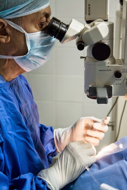 الدكتور علي يقوم بإجراء عملية لمريض